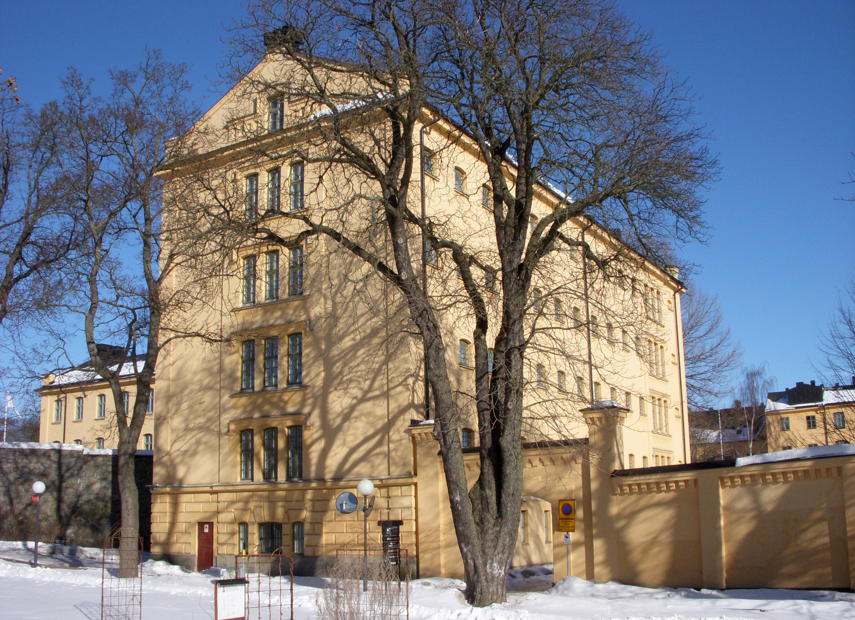 Före detta Kronohäktet på Långholmen